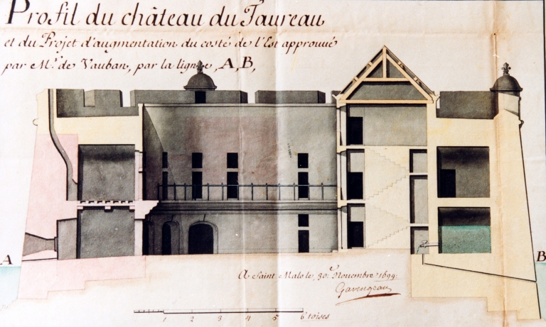 Profil du chateau du taureau par Garangeau